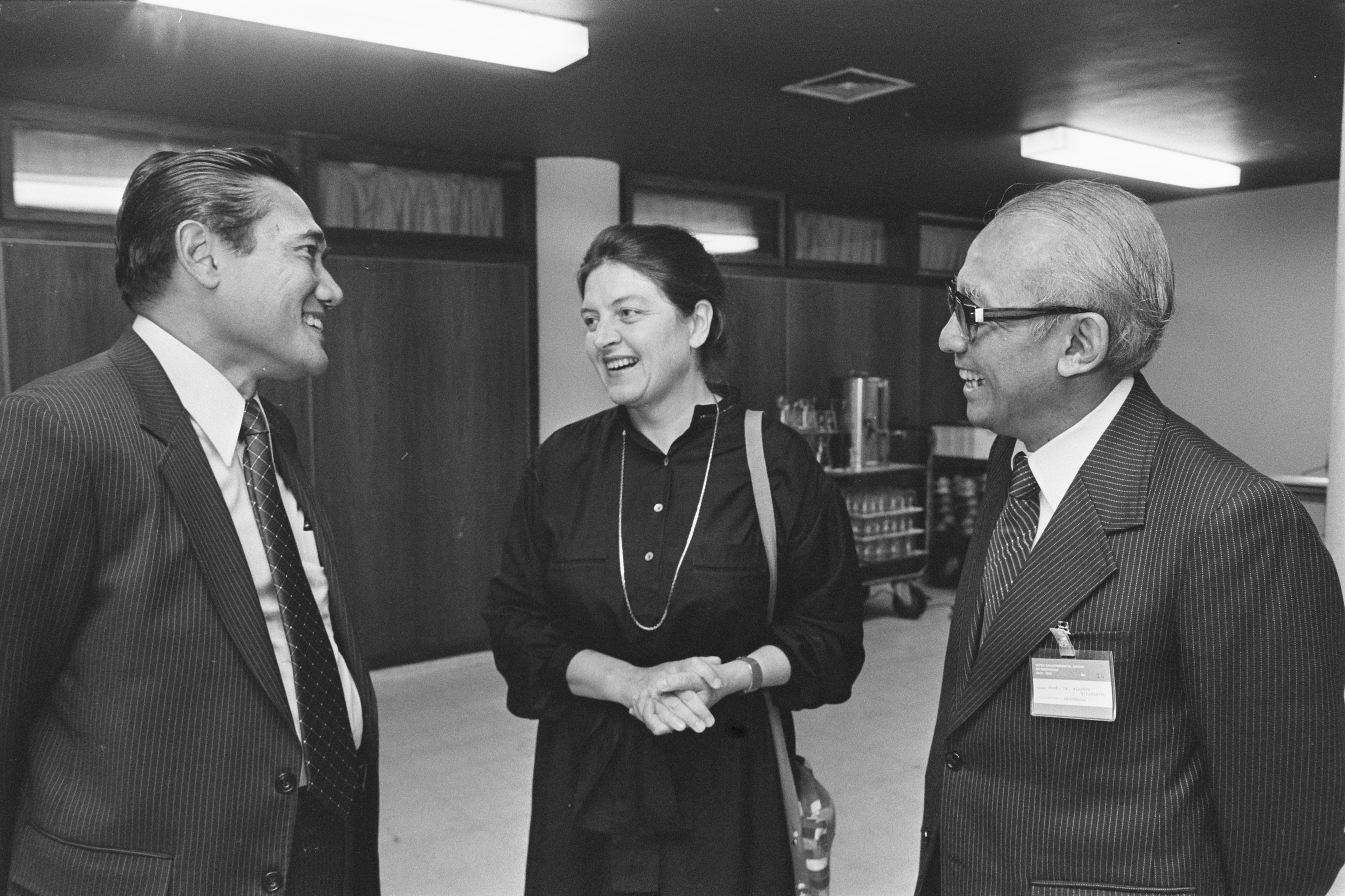 Collectie / Archief : Fotocollectie Anefo Reportage / Serie : [ onbekend ] Beschrijving : Minister Schoo (Ontwikkelingssamenwerking) in gesprek met de delegatieleider van Indonesië prof. Ali Wardana (l) op de conferentie van de Intergouvernementele Groep Inzake Indonesië (IGGI) 1983 in Den Haag Datum : 13 juni 1983 Locatie : Den Haag, Zuid-Holland Trefwoorden : conferenties, ministers, ontwikkelingssamenwerking, politici Persoonsnaam : Schoo, Eegje, Wardhana, Ali Fotograaf : Croes, Rob C. / Anefo Auteursrechthebbende : Nationaal Archief Materiaalsoort : Negatief (zwart/wit) Nummer archiefinventaris : bekijk toegang 2.24.01.05 Bestanddeelnummer : 932-6190